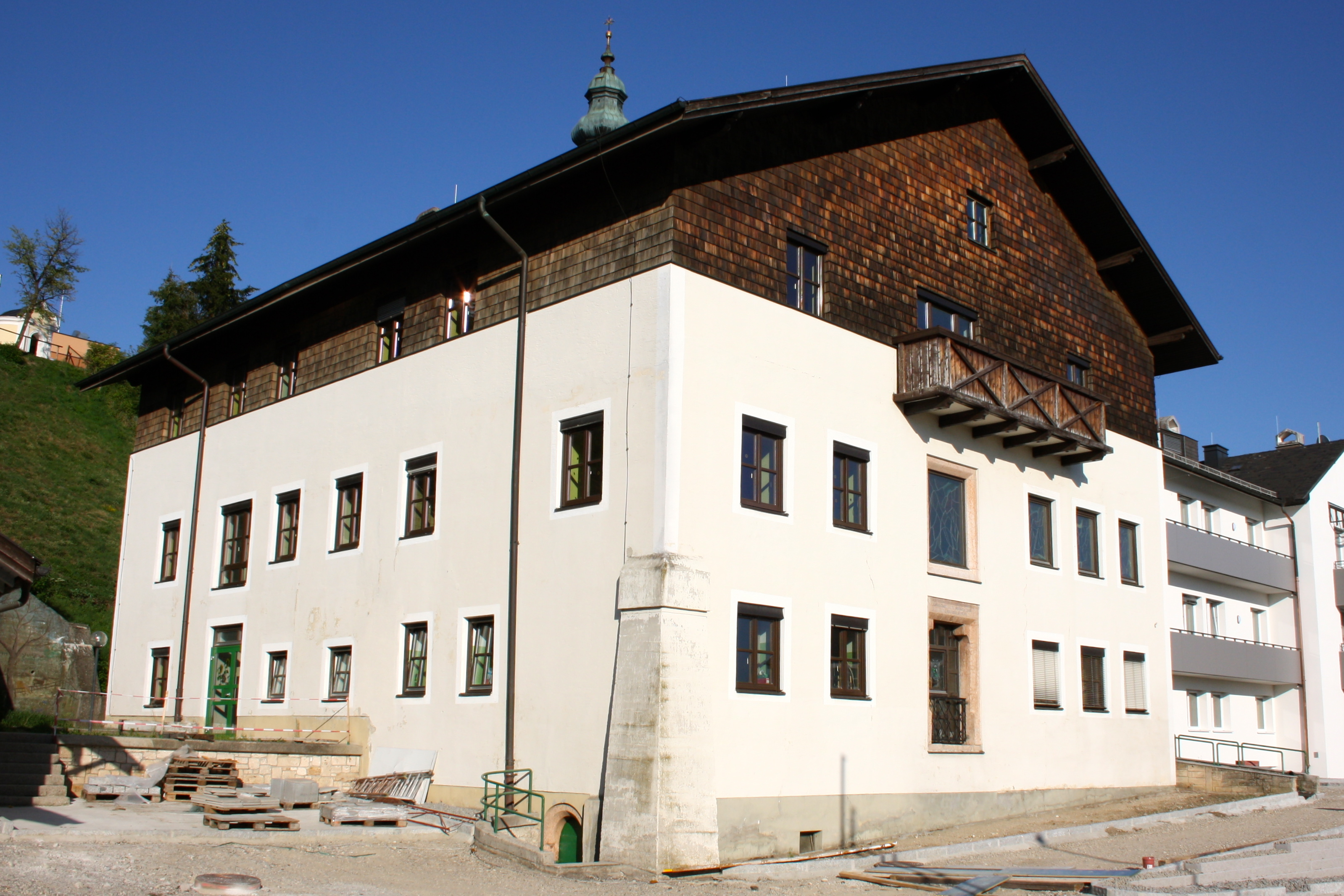 Altersheim, Alter Pfarrhof